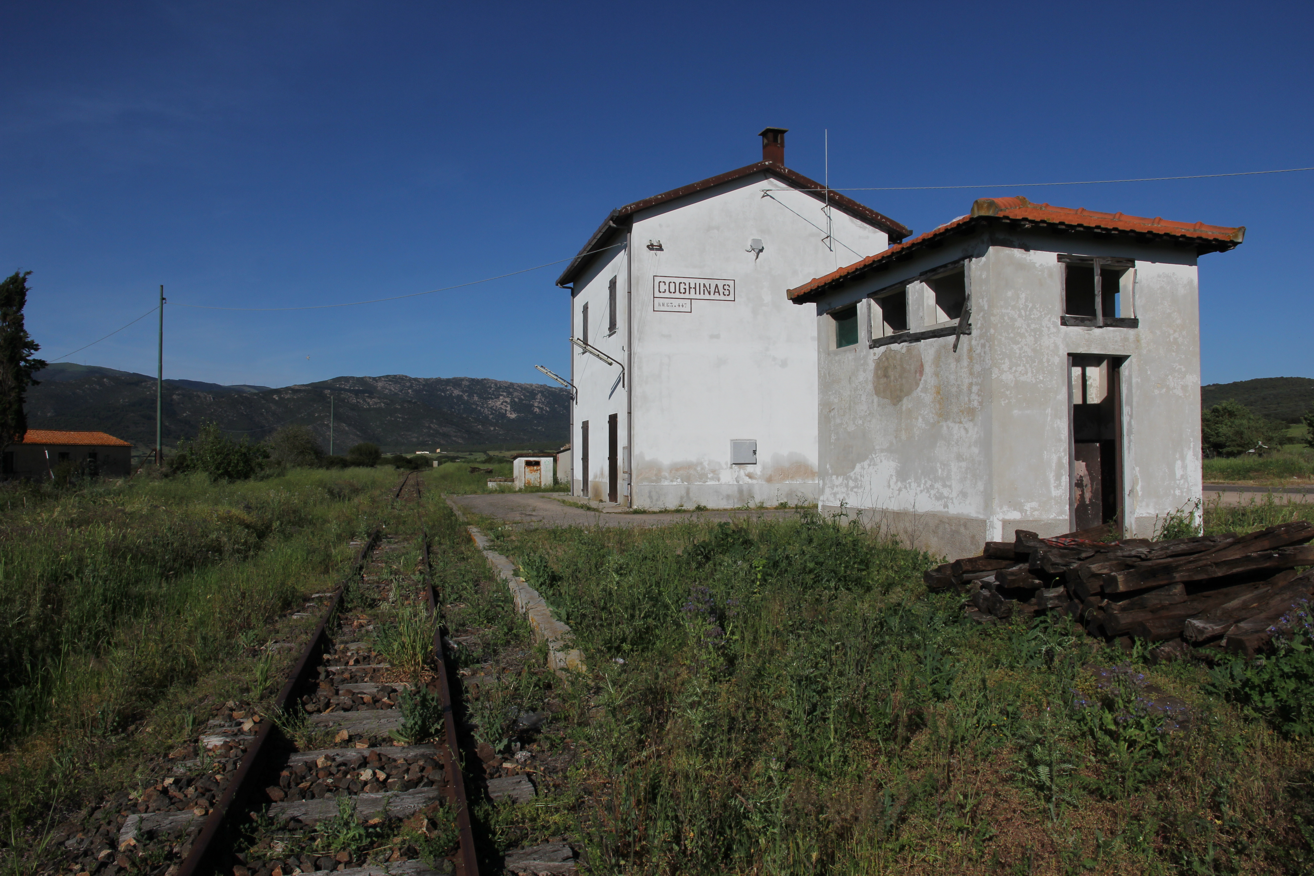 Perfugas, stazione ferroviaria di Coghinas - Ferrovia Sassari-Tempio-Palau